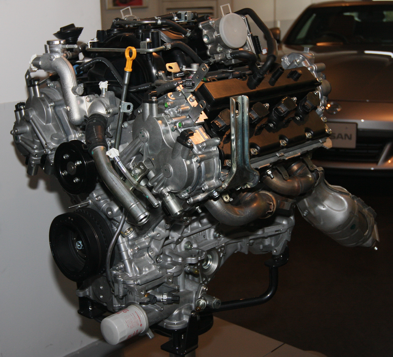 2008 Nissan VK50VE engine. V8 5,026cc